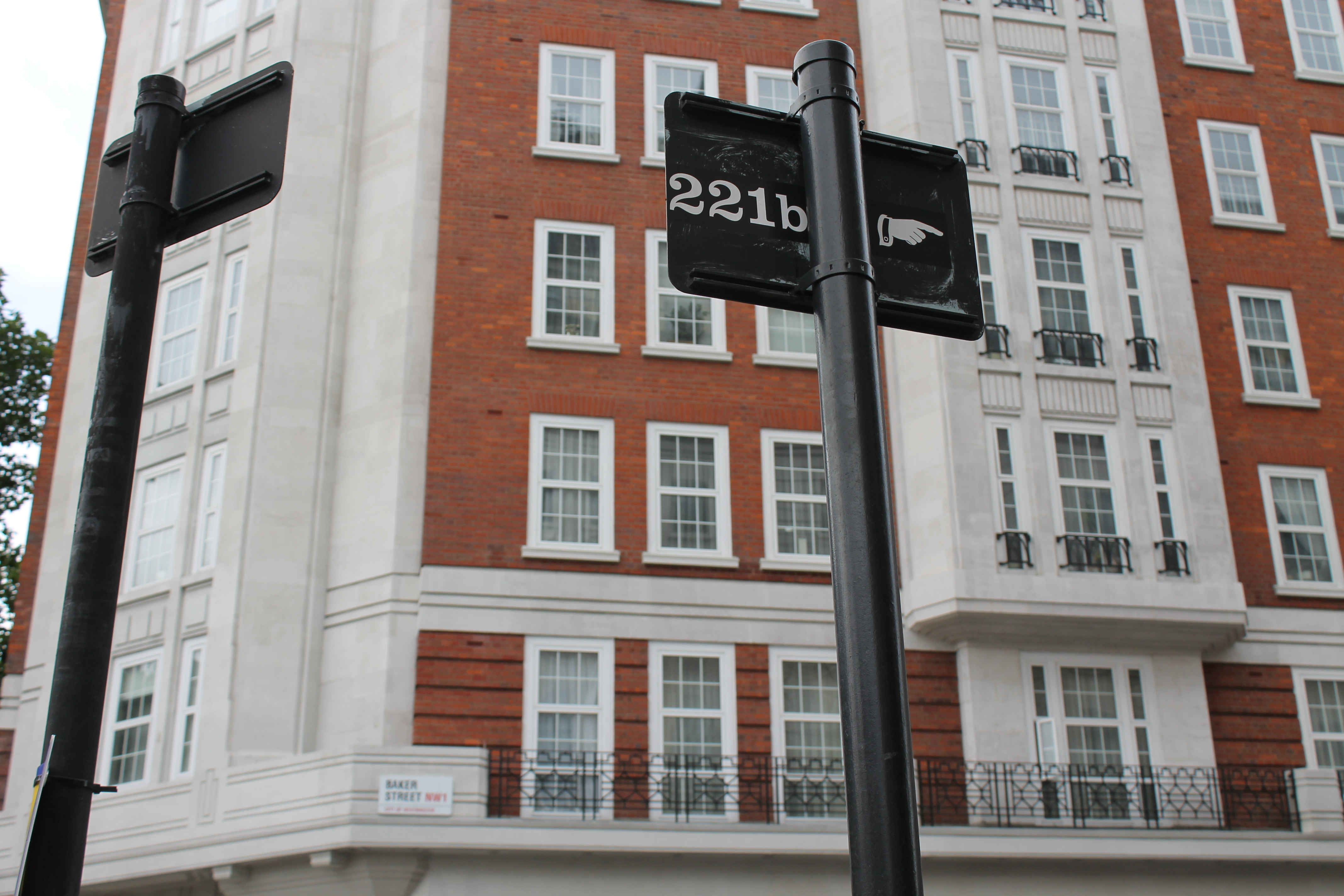 221b at Baker Street, London.